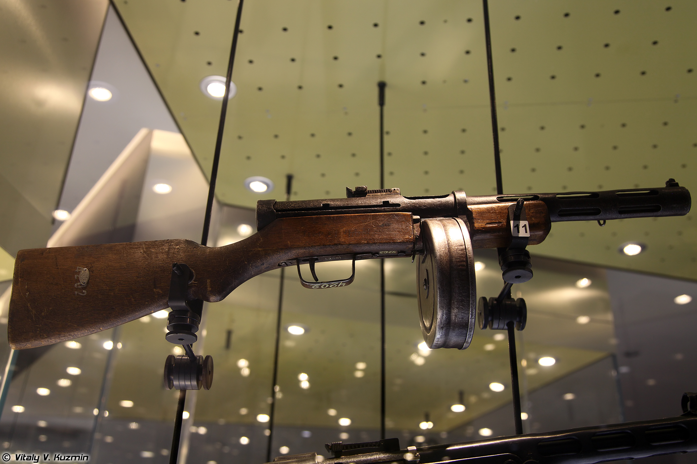 Пистолет-пулемет Дегтярева ППД-40